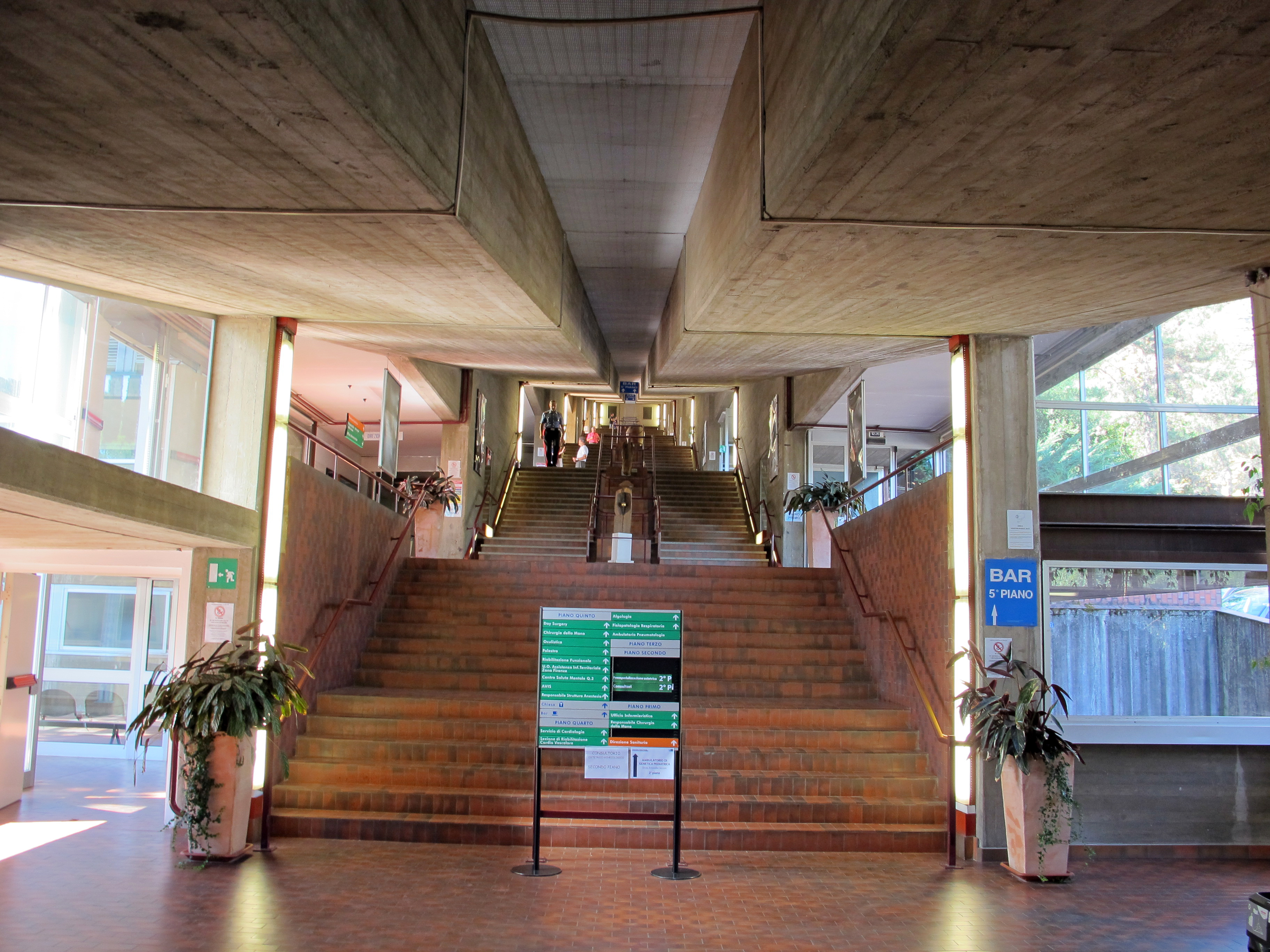 Ospedale Pietro Palagi, Florence